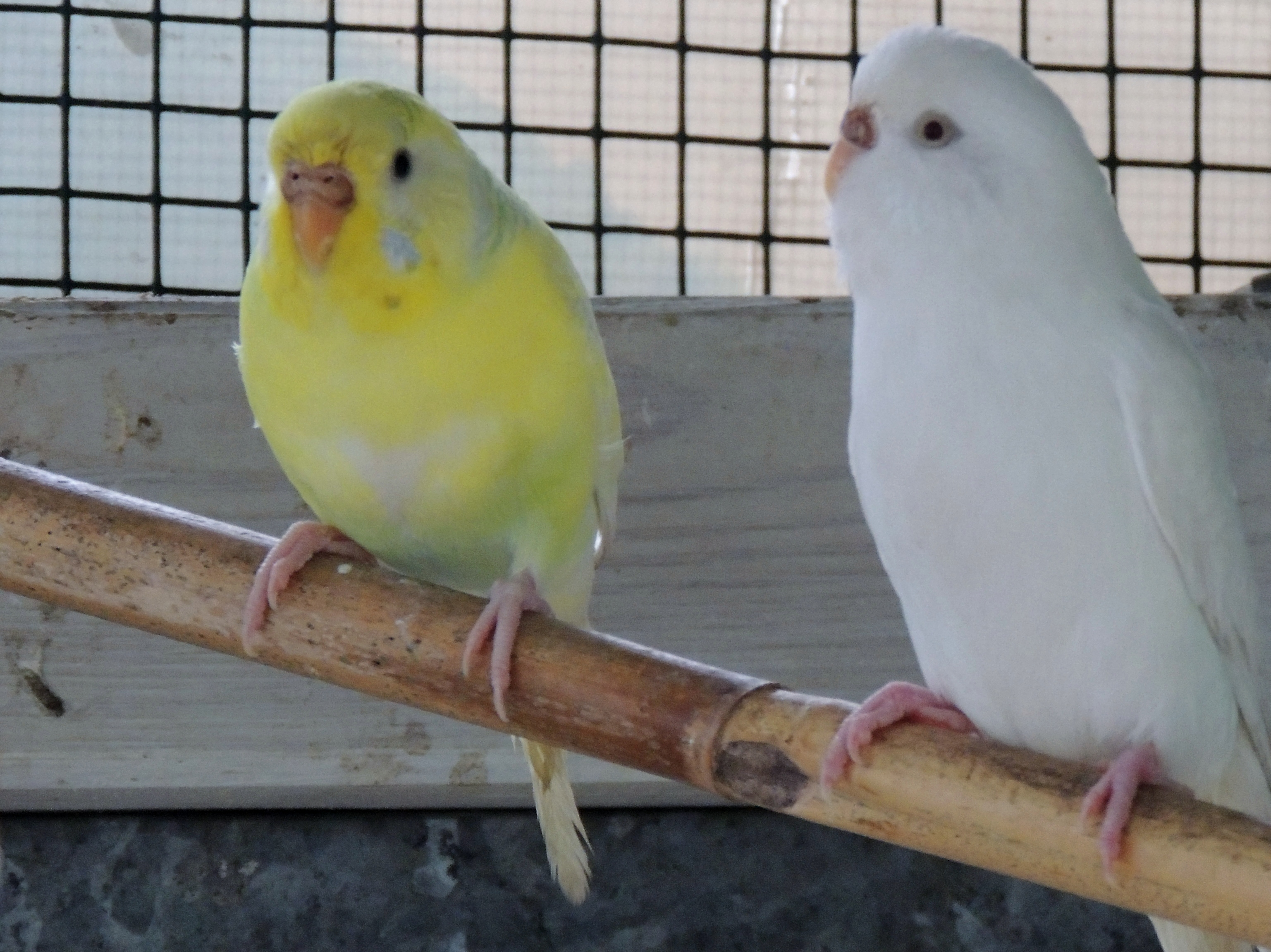 Grasparkieten 2 vrouwtjes